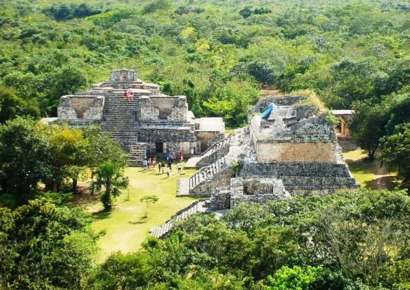 Vista desde templo mayor en Ek Balam